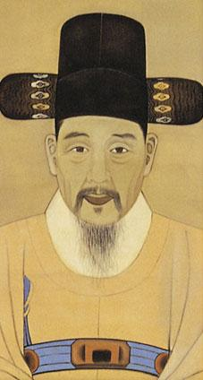 박규수 영정